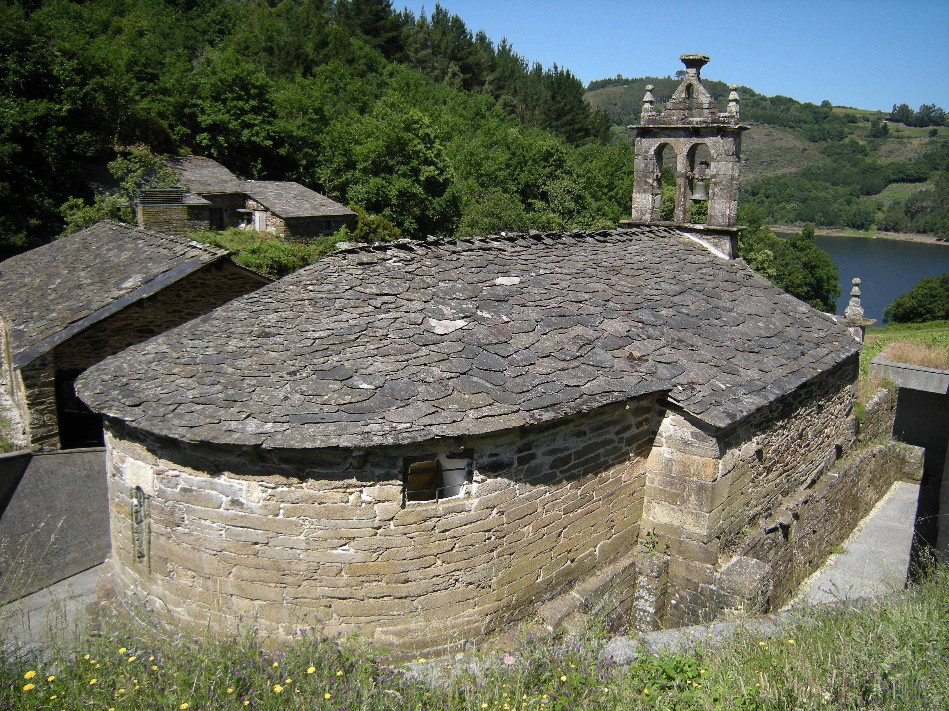 Igrexa de San Facundo de Ribas de Miño, Paradela, Galiza